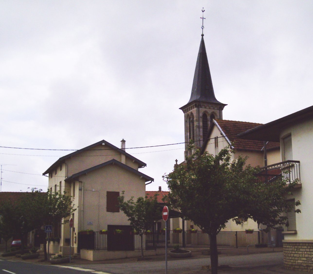 Cerville 54 - France Le 27 mai 2006